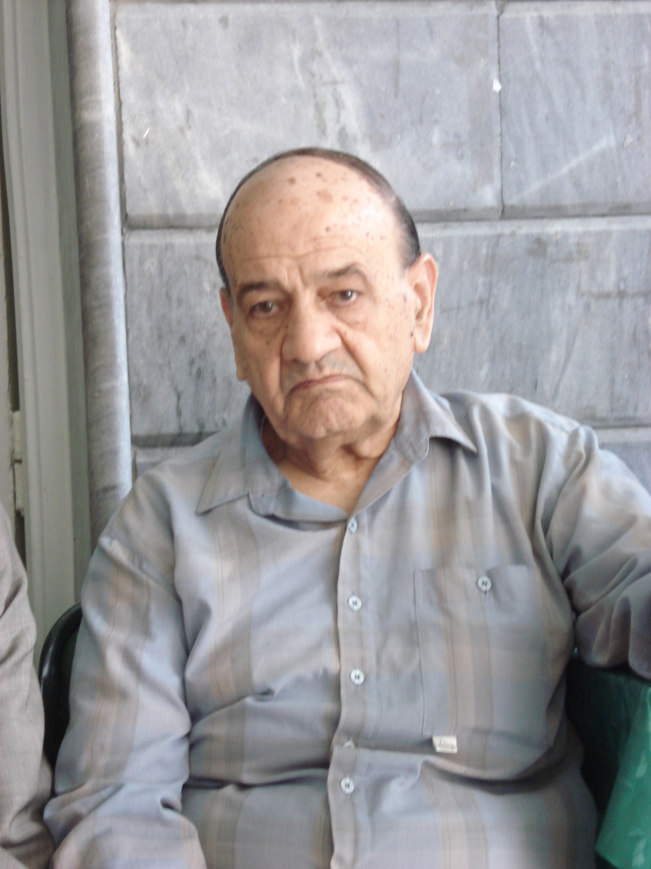 حسین راضی از بنیان گذار ودبیرکل حزب مردم ایران و عضو شورای مرکزی جبهه ملی ایران